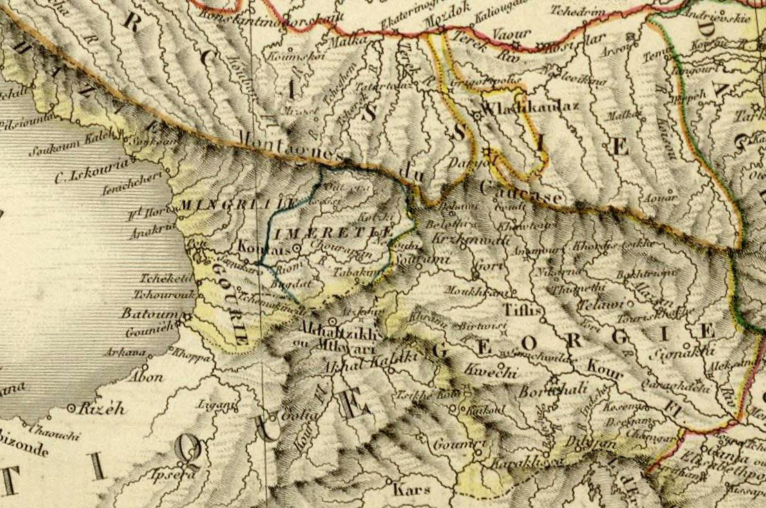 Carte de La Russie D'Europe avec ses nouvelles acquisitions sur la Suede, la Pologne, et le Caucase. Par L. Vivien Geographe. 1824. Grave par Giraldon Bovinet. A Paris. Chez Menard et Desenne, Rue Git le Coeur, No. 8. 2eme Feuille.